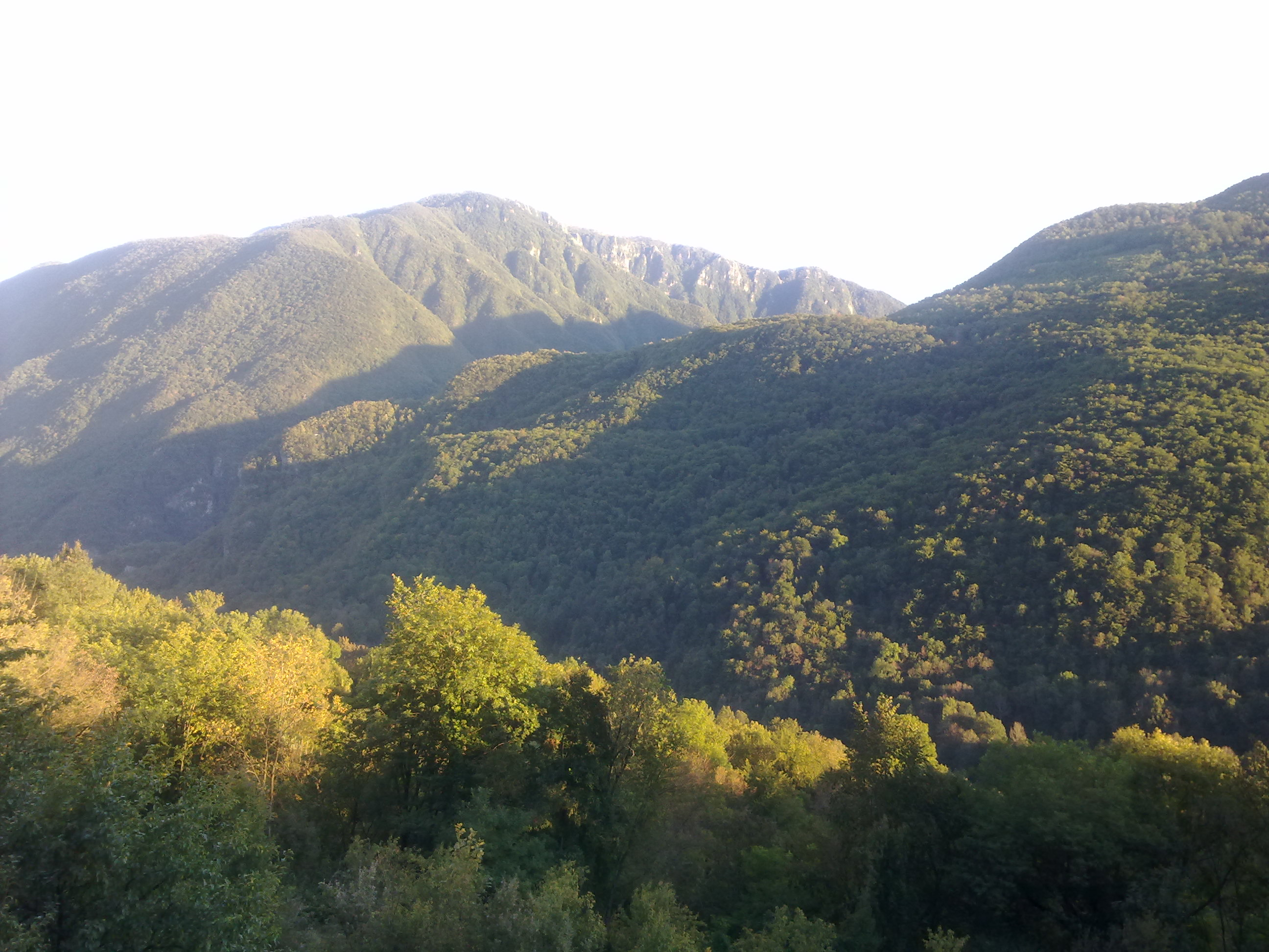 Matajur v ozadju.